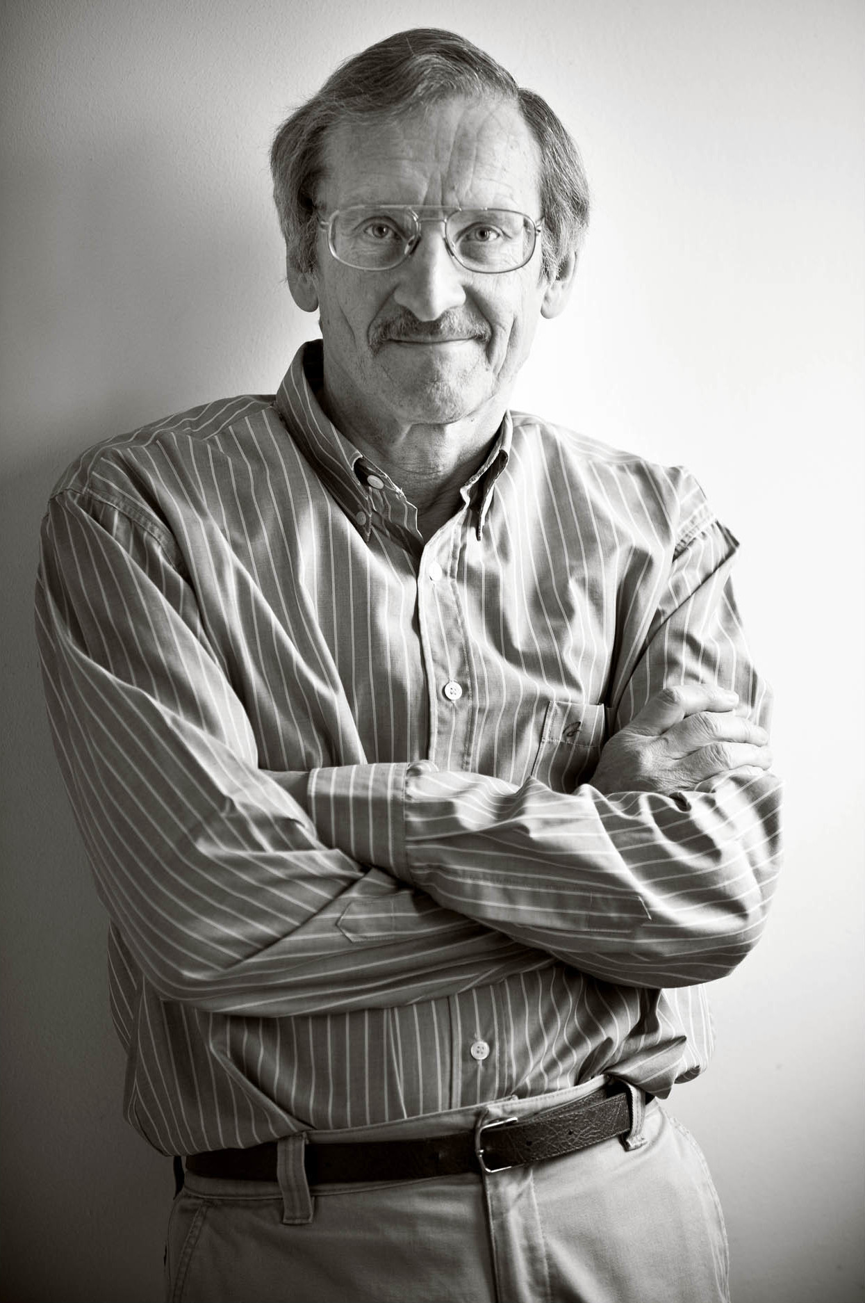 Paul Claes, auteur en classicus.